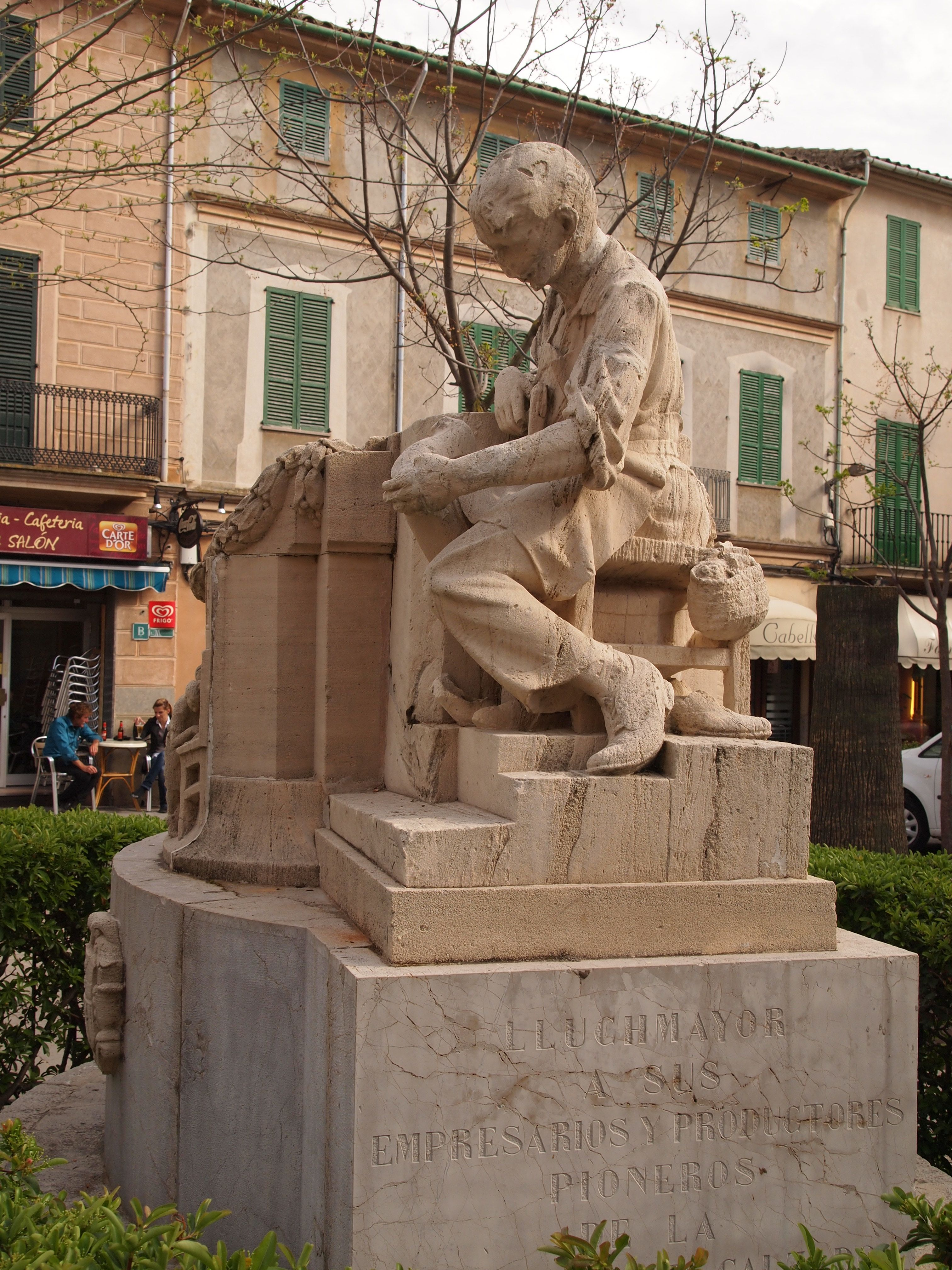 Estàtua del Sabater. Per a retre homenatge a tots aquells pioners de la indústria del calçat Realitzada l'any 1963. De marès de Santanyí obra de l'escultor Tomàs Vila. Vista lateral.